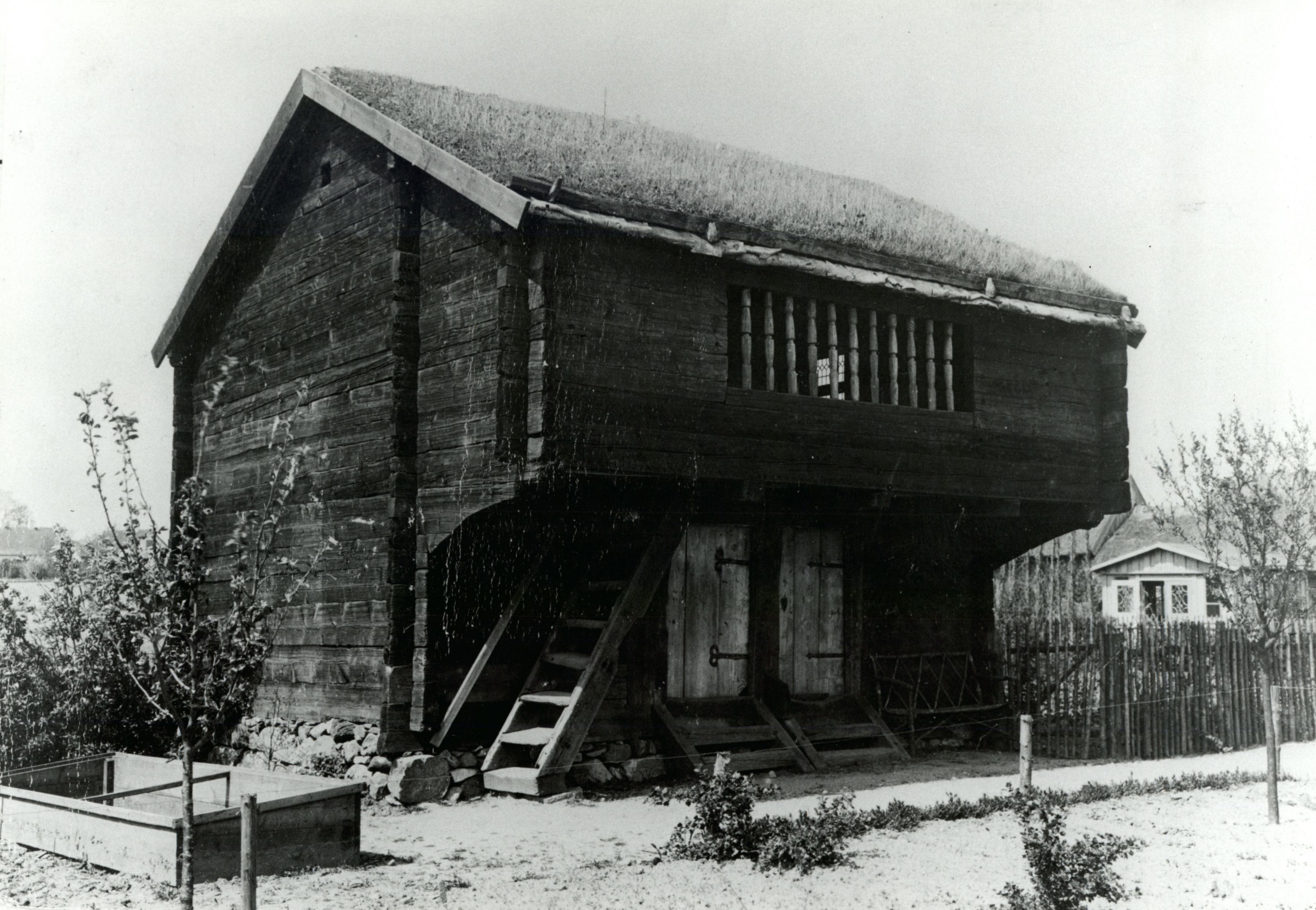 Loftshuset Eksteriør. Loftshuset paa dets 1. Plads paa Museet. Set fra Sydøst med Lysthuset Glarborg og Næsgaardene i baggrunden. Elfelt fot. - See more at